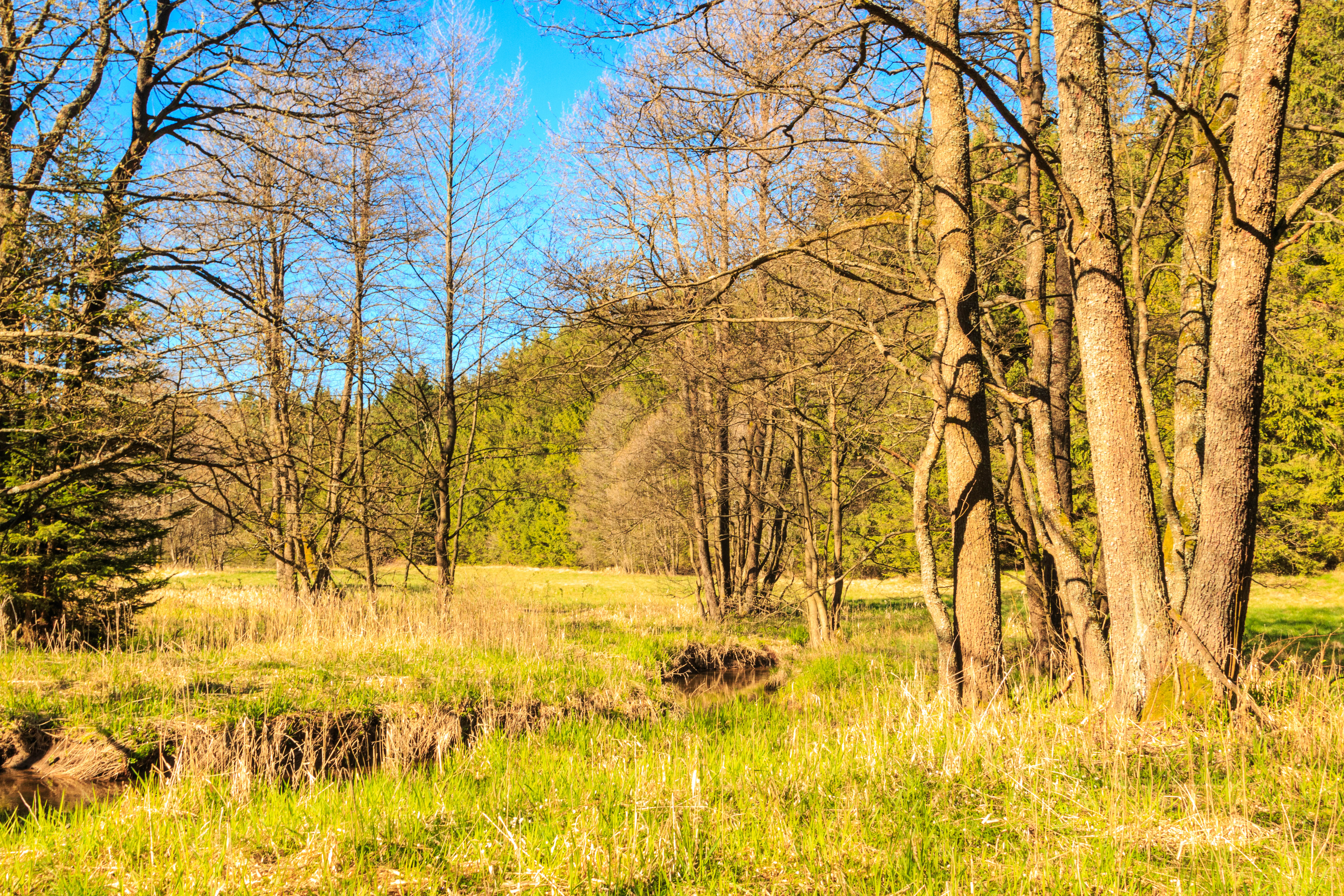 Přírodní památka Utopenec Project: Chráněná území